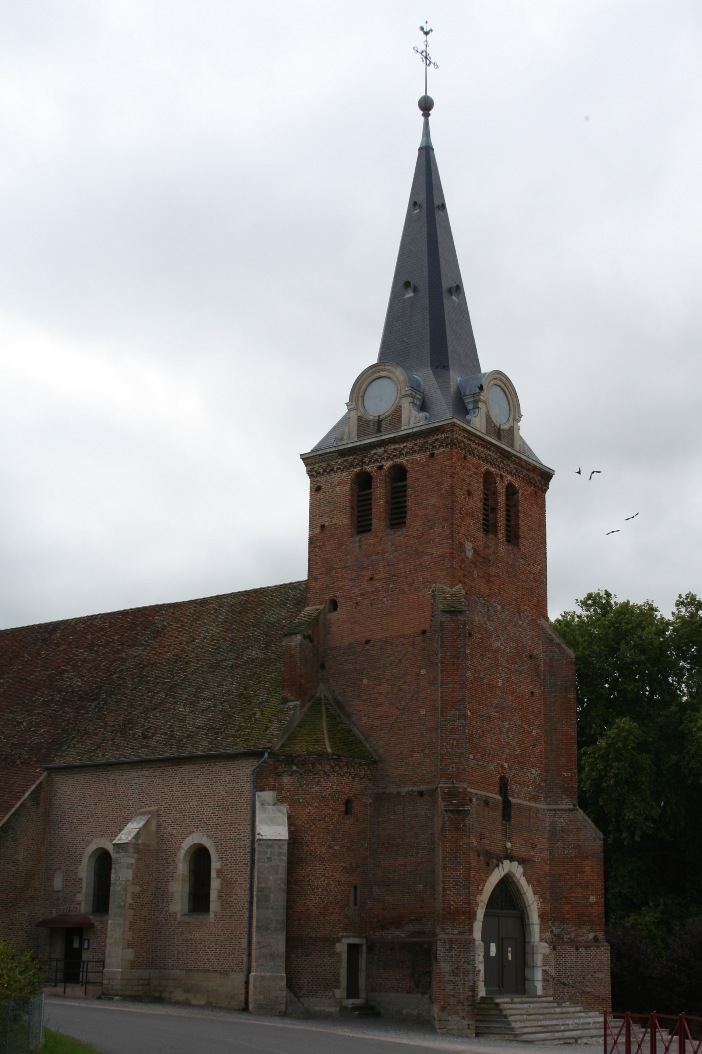 Pierre-de-Bresse Kirche von Norden